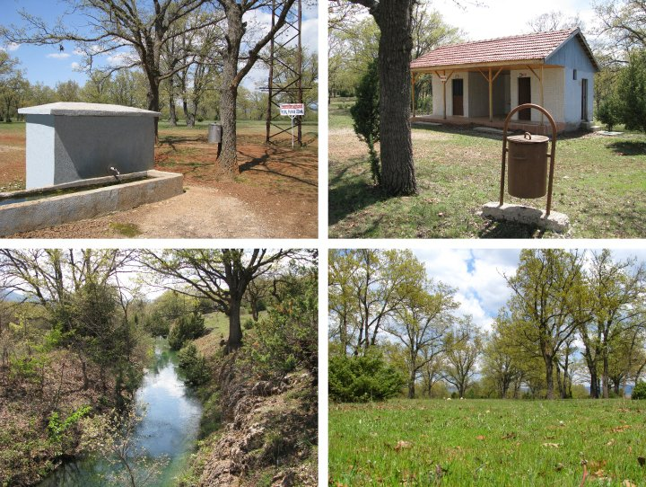 Dogal Piknik Alani